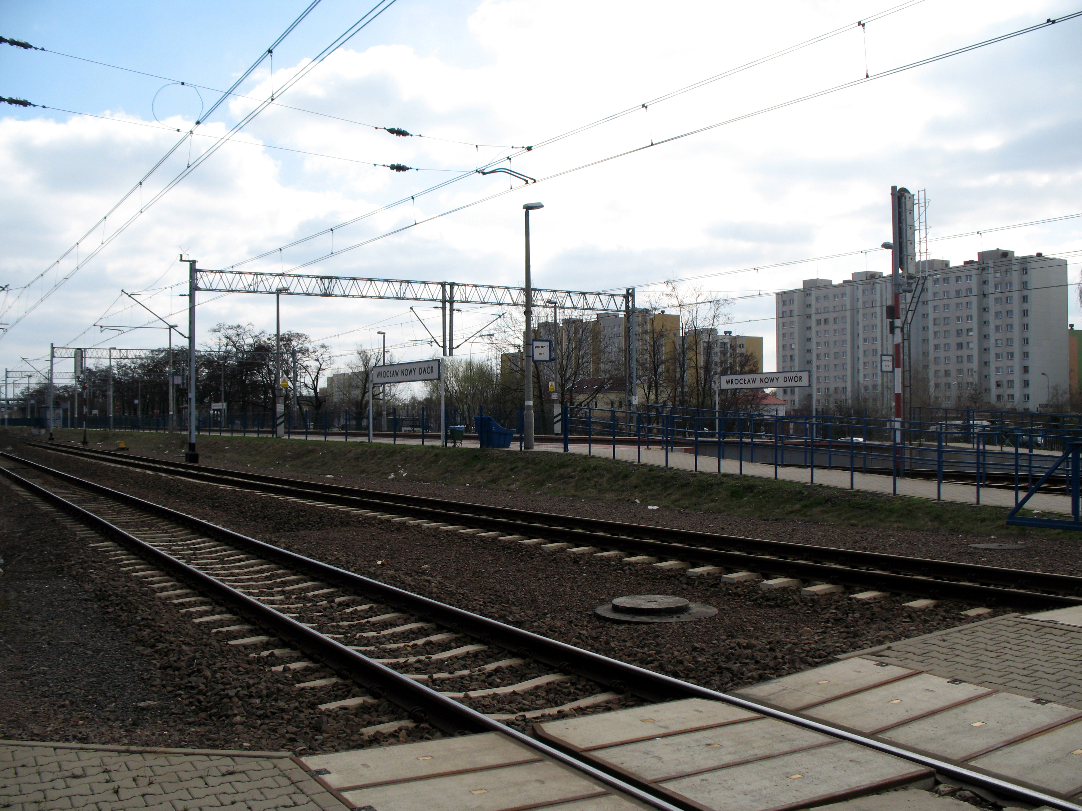 Stacja kolejowa Wrocław Nowy Dwór